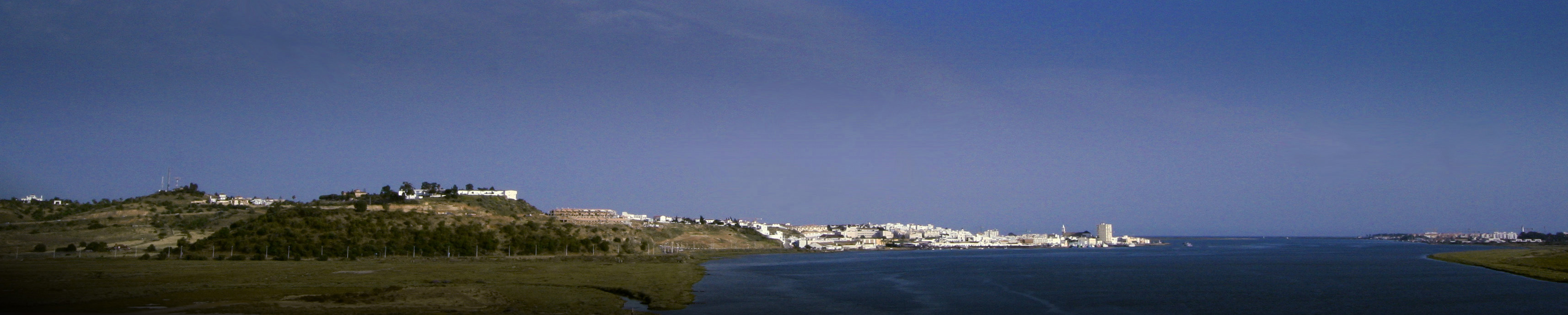 Ayamonte. Desembocadura del río Guadiana.